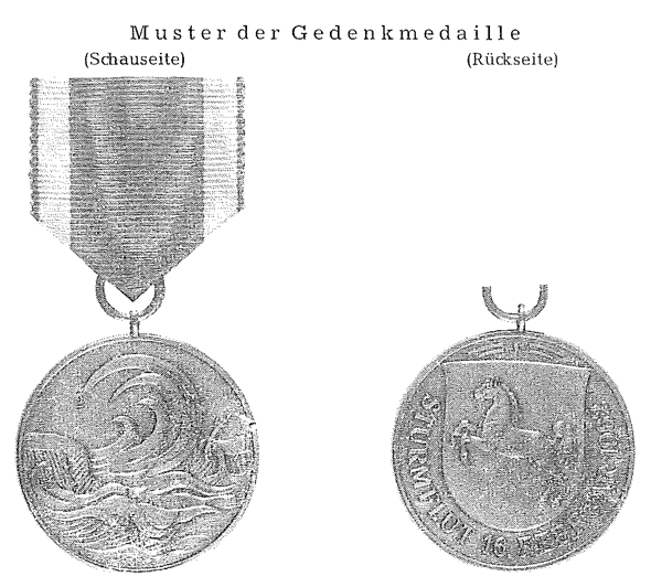 Niedersächsische Gedenkmedaille aus Anlass der Sturmflutkatastrophe vom 16. Februar 1962.jpg (amtlicher Vordruck)